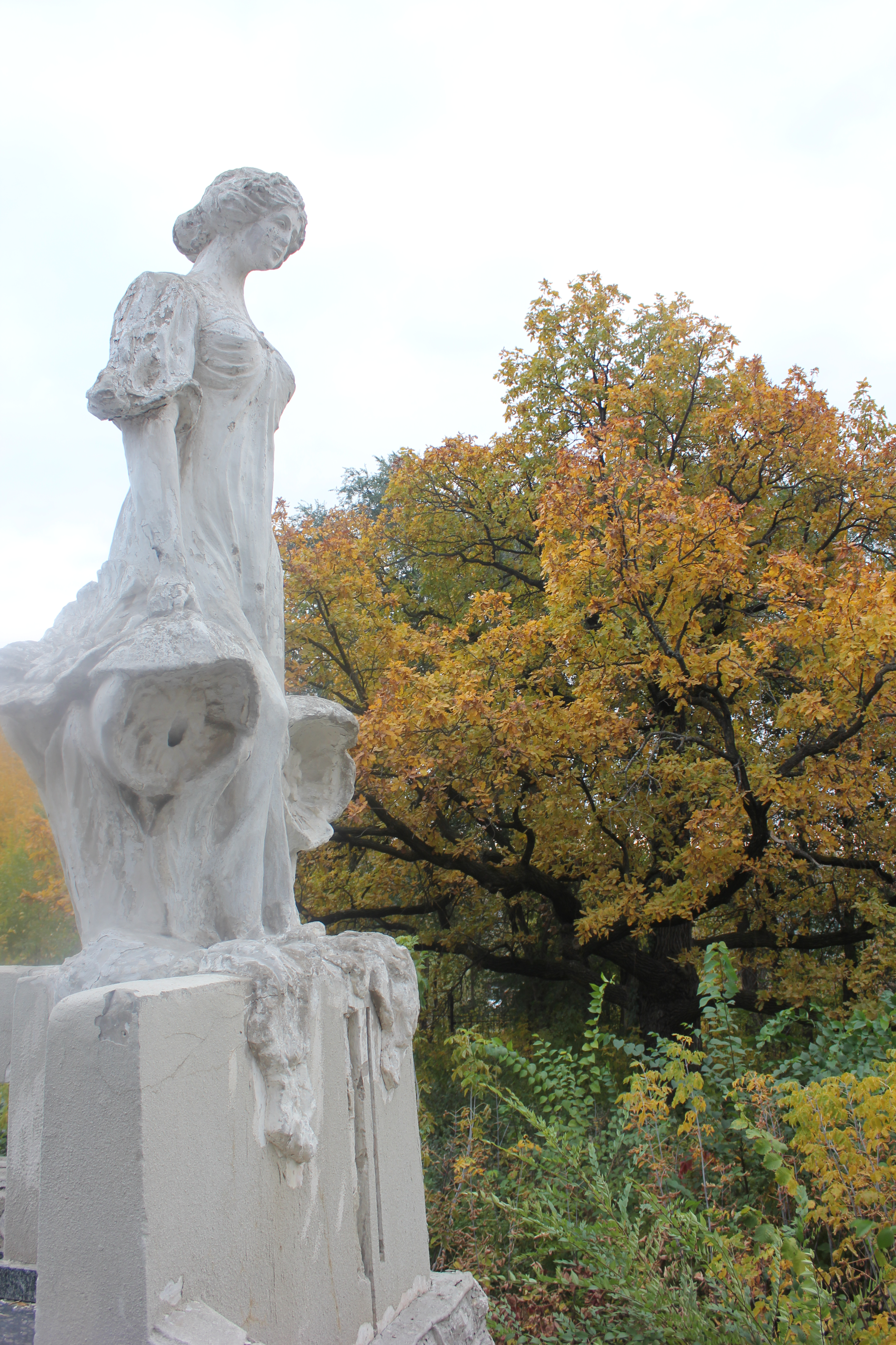 Дача Головкина (комплекс дачи Головкина) (Самарская область, Самара, Советской Армии улица, 296)